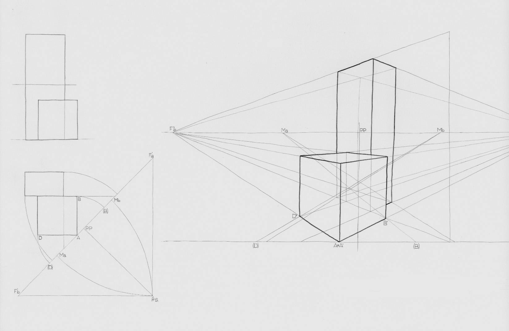 Disegno a mano libera che illustra sinteticamente la costruzione di una prospettiv con il metodo dei punti misuratori. Il file è stato creato scandendo il disegno con uno scanner.